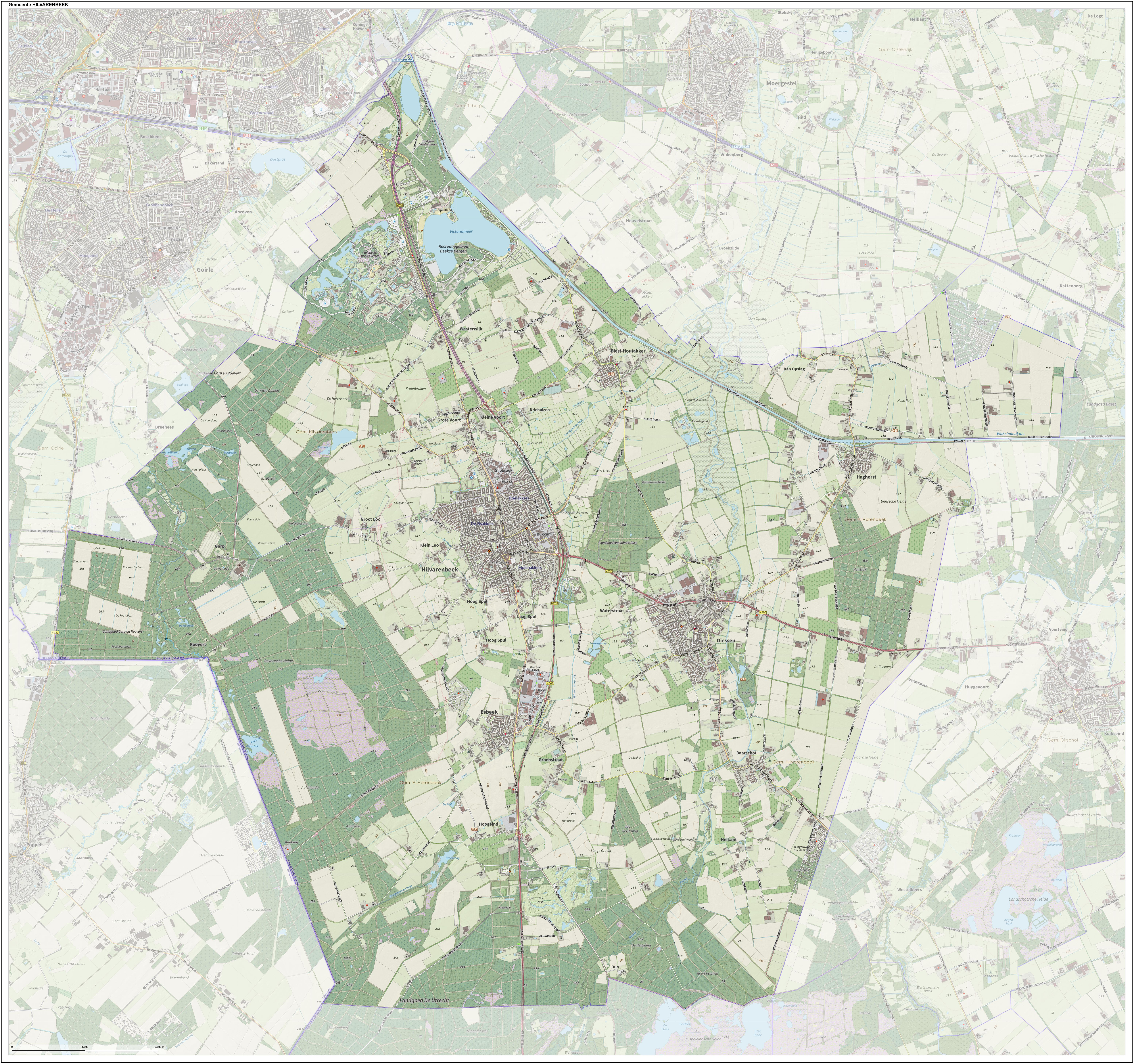 Topografische gemeentekaart. Resolutie: 400 pixels/km. Kaartbeeld samengesteld uit de open geodata van de Top10NL en Top25namen (Kadaster), Creative Commons-BY licentie. Gebouwvlakken uit open geodata BAG extract. Wegen uit de OpenStreetMap, OpenStreetMap community. Reliëfschaduw uit de Actuele Hoogtekaart AHN2. Samenstelling en kleurenschema: Jan-Willem van Aalst, met QGIS. Zie ook de Legenda.